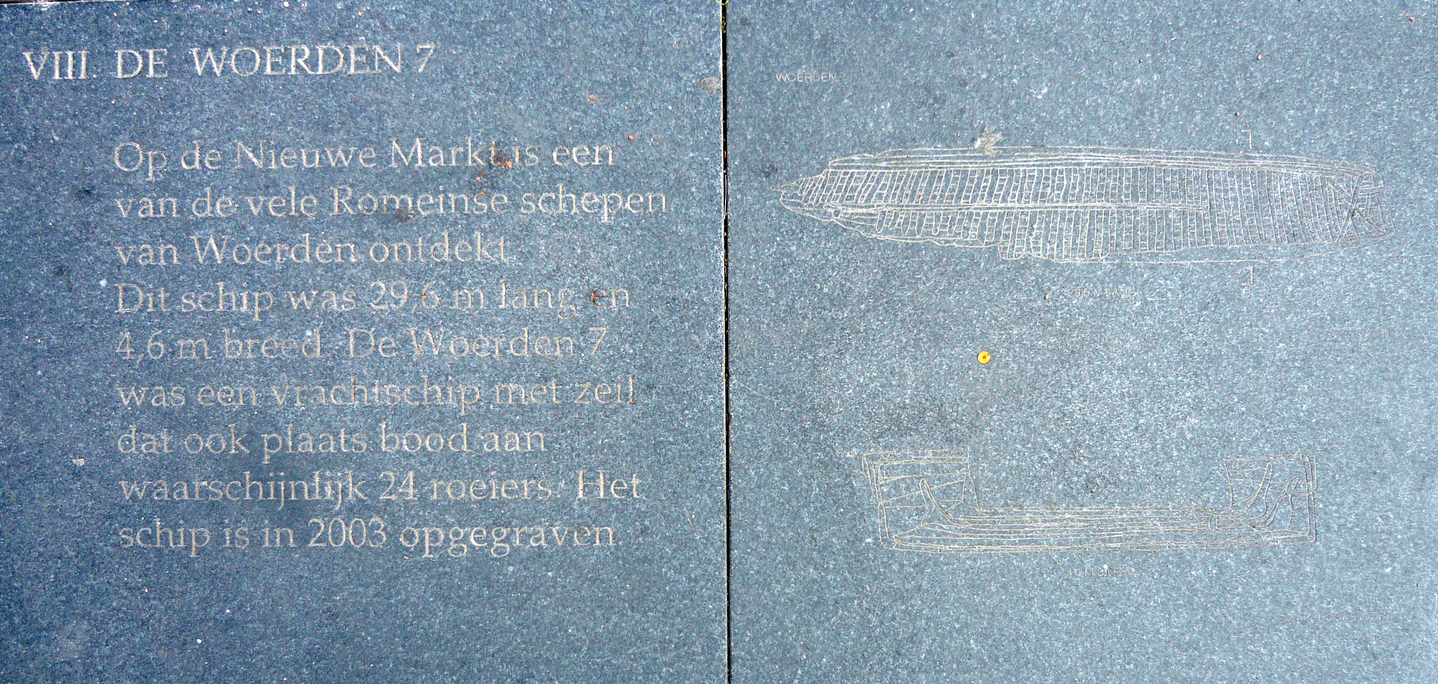 Darstellung und Kurzbeschreibung der Woerden 7, dargestellt auf einer Steinplatte in der Pflasterung des Kerkpleins von Woerden